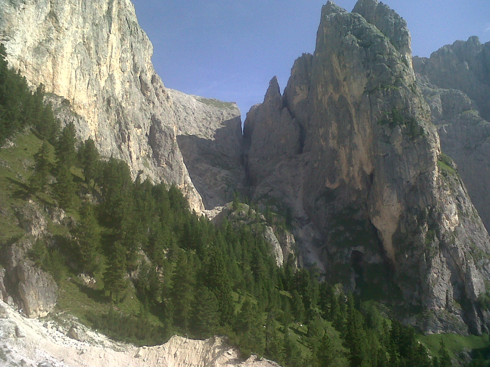 Il Passo delle Scalette visto da sud, dal Sentiero delle Scalette, Gruppo del Catinaccio.